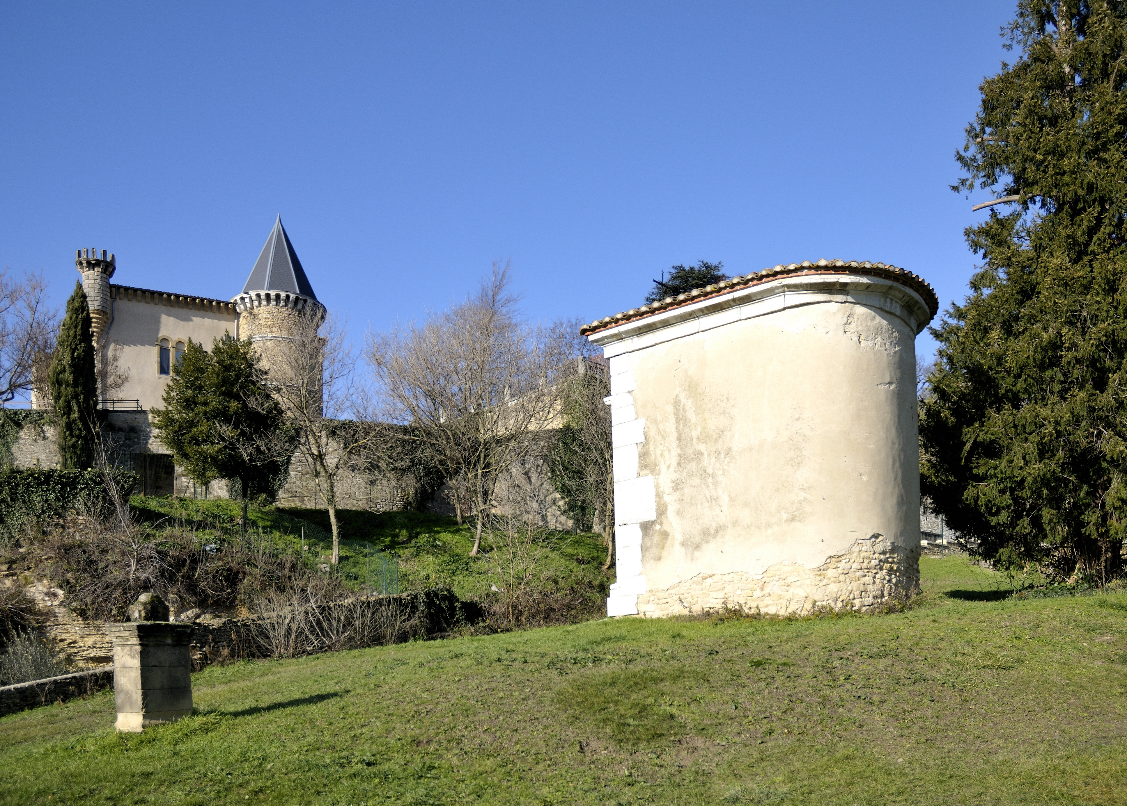 chapelle attenante au chateau